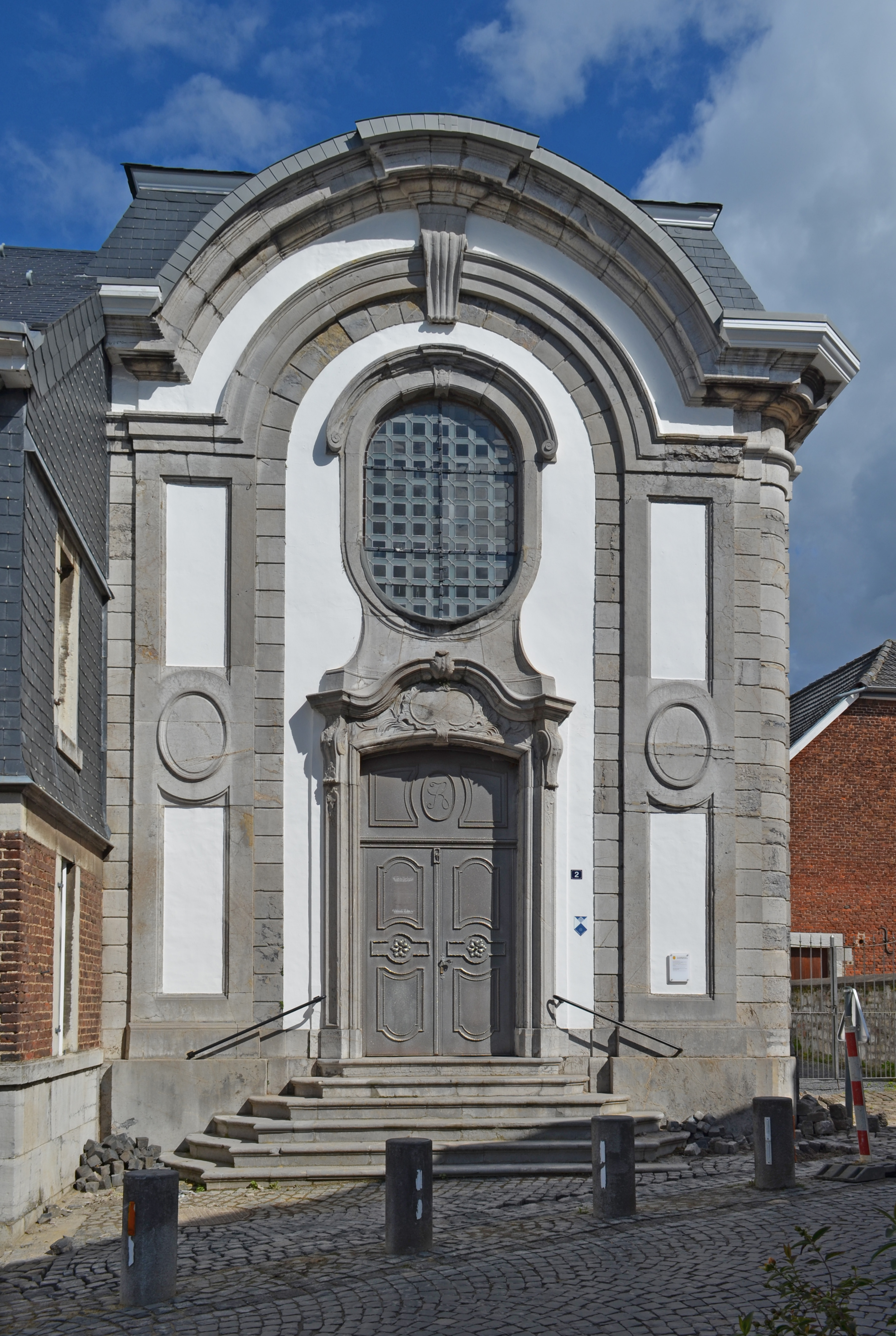 Sankt Johannes-Baptist Enthauptungskapelle in Eupen-Nispert